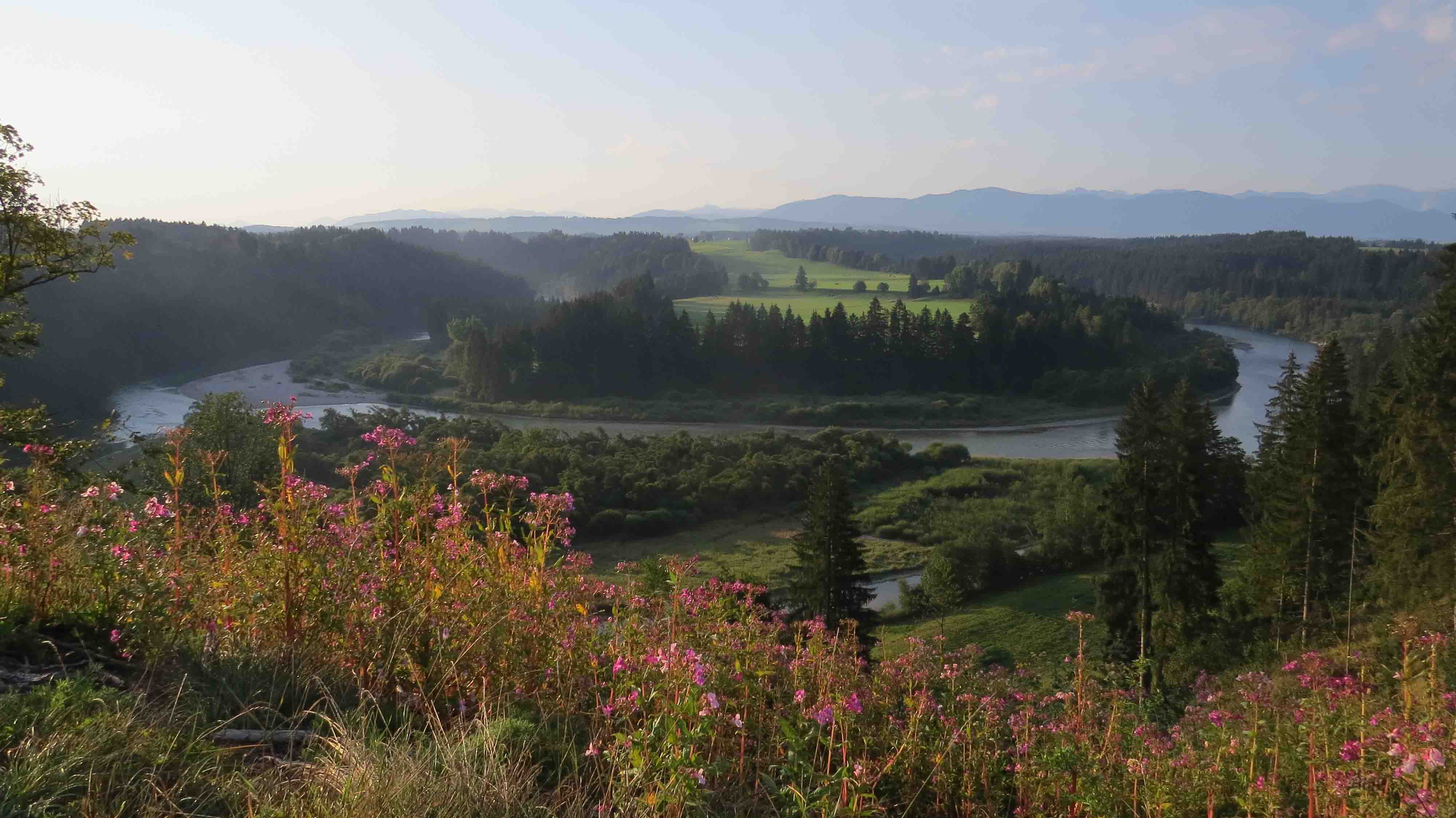 Litzauer Schleife bei Burggen, Geotop-Nummer: 190R034.